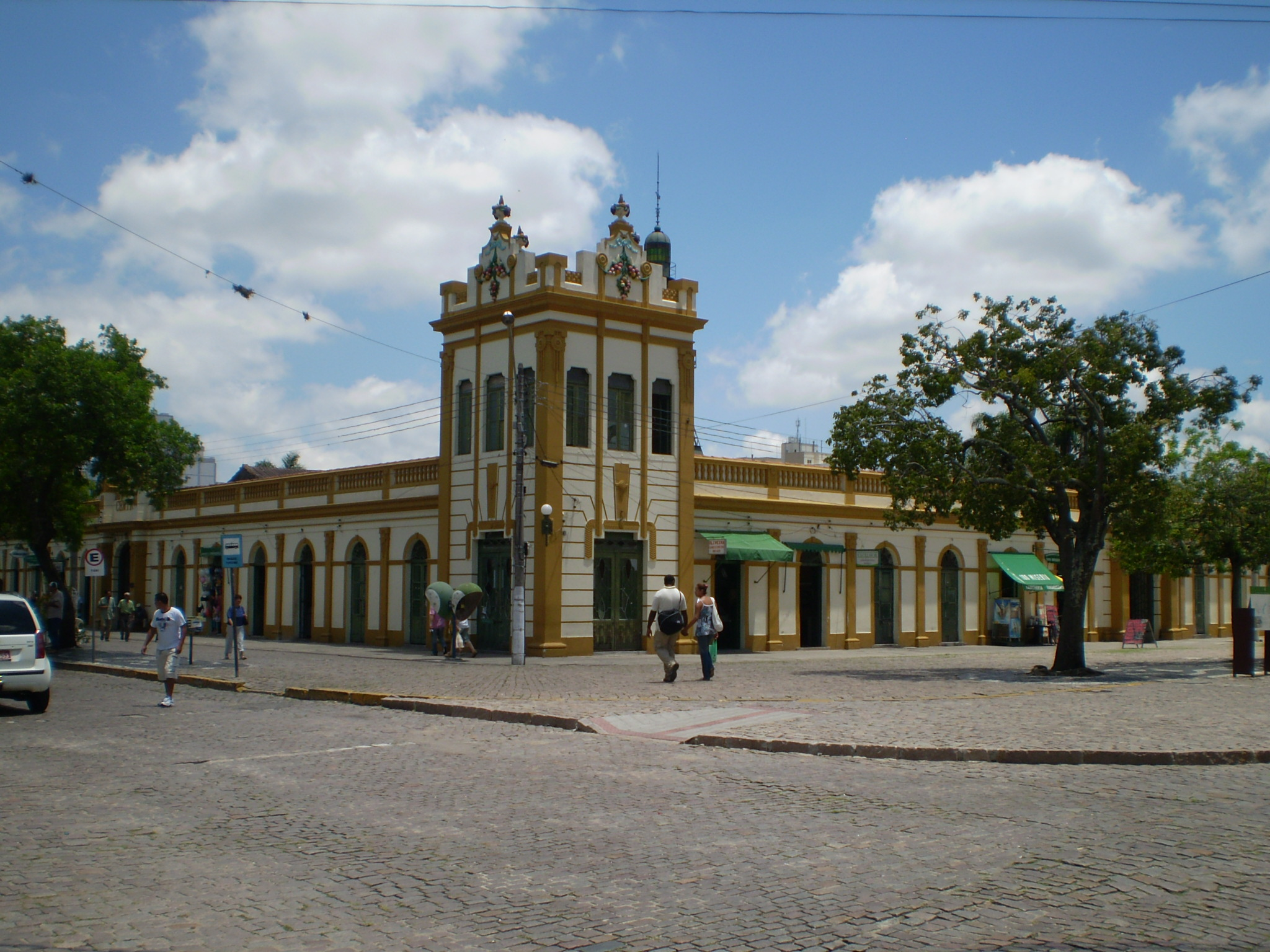 Central market of Pelotas, Rio Grande do Sul, Brazil.